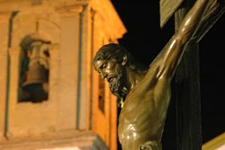 Sto. Cristo de la Sangre de EL Saucejo